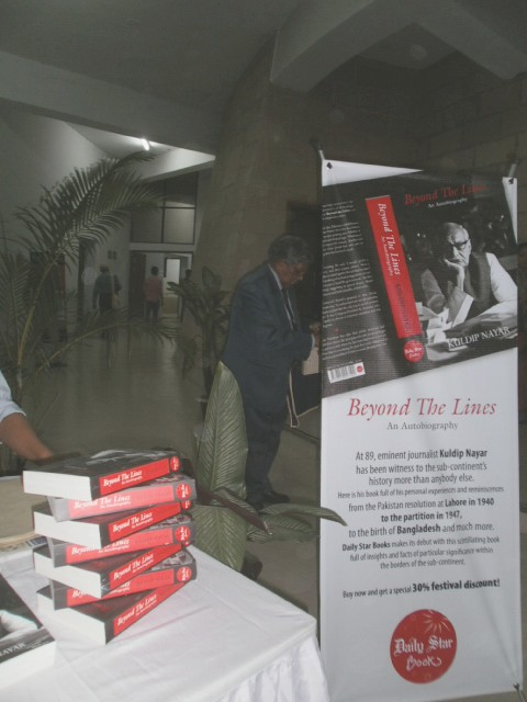 "Beyonf the Lines"-Autobiography of Kuldip Nayar was published in Dhaka in November 2012